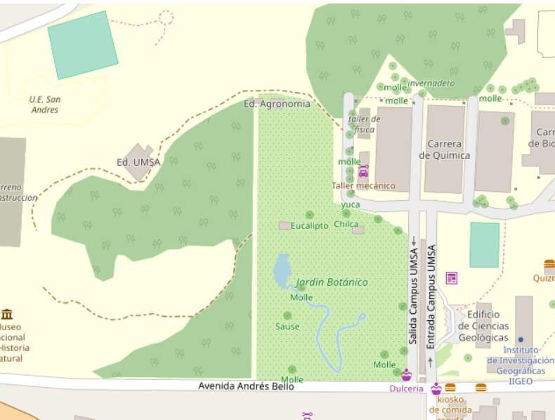 Mapa del jardín Botánico La Paz en OSM en marzo de 2019